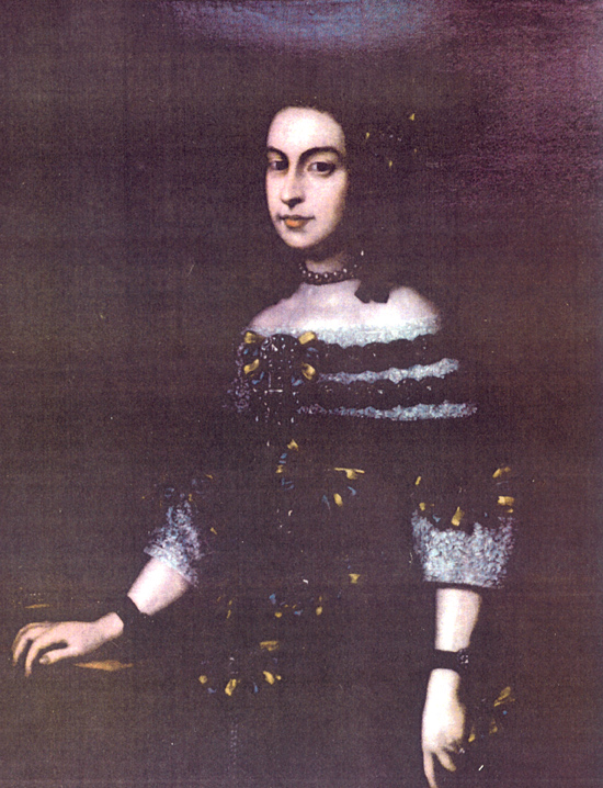 Terza moglie di Francesco I d'Este, duca di Modena e Reggio col dominio della Garfagnana. Duchessa dal 1654 al 1658.